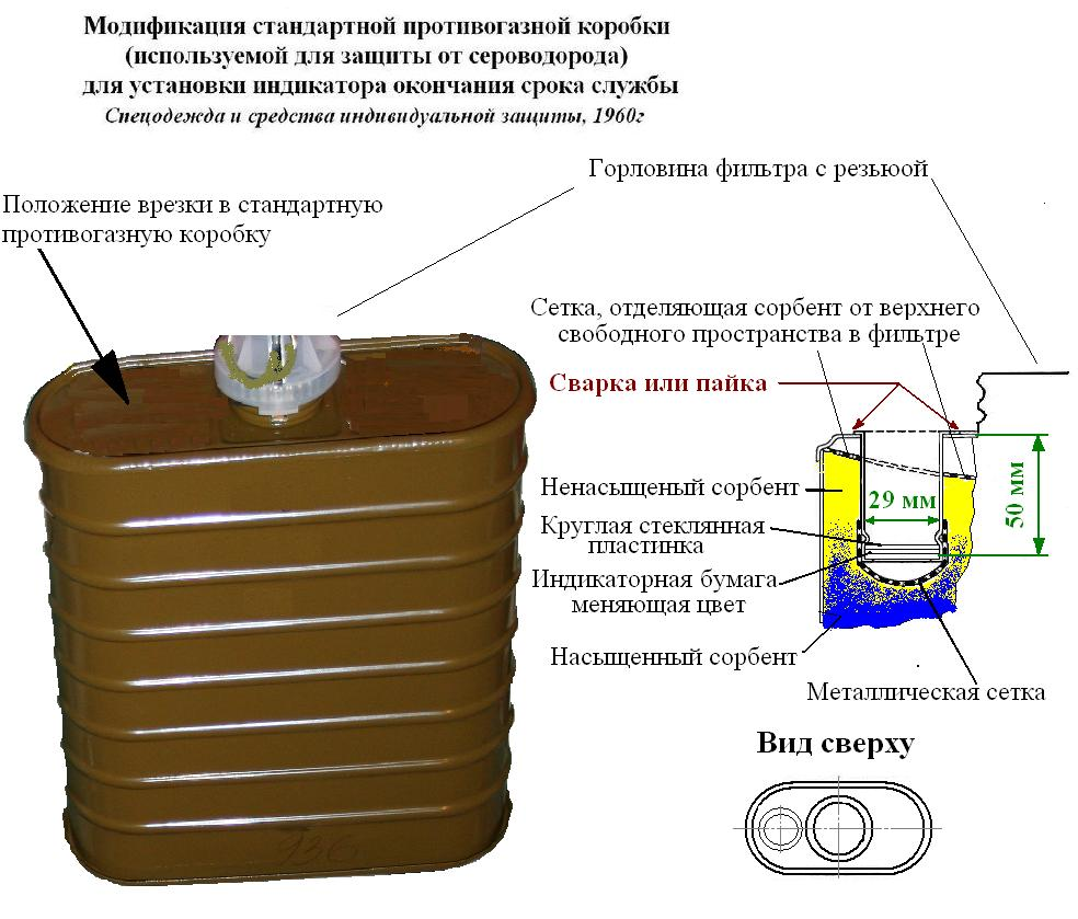 Файл со схемой пассивного индикатора окончания срока службы противогазного фильтра, разработанного в 1960-х в СССР для защиты от сероводорода, изготавливался модификацией стандартной противогазной коробки